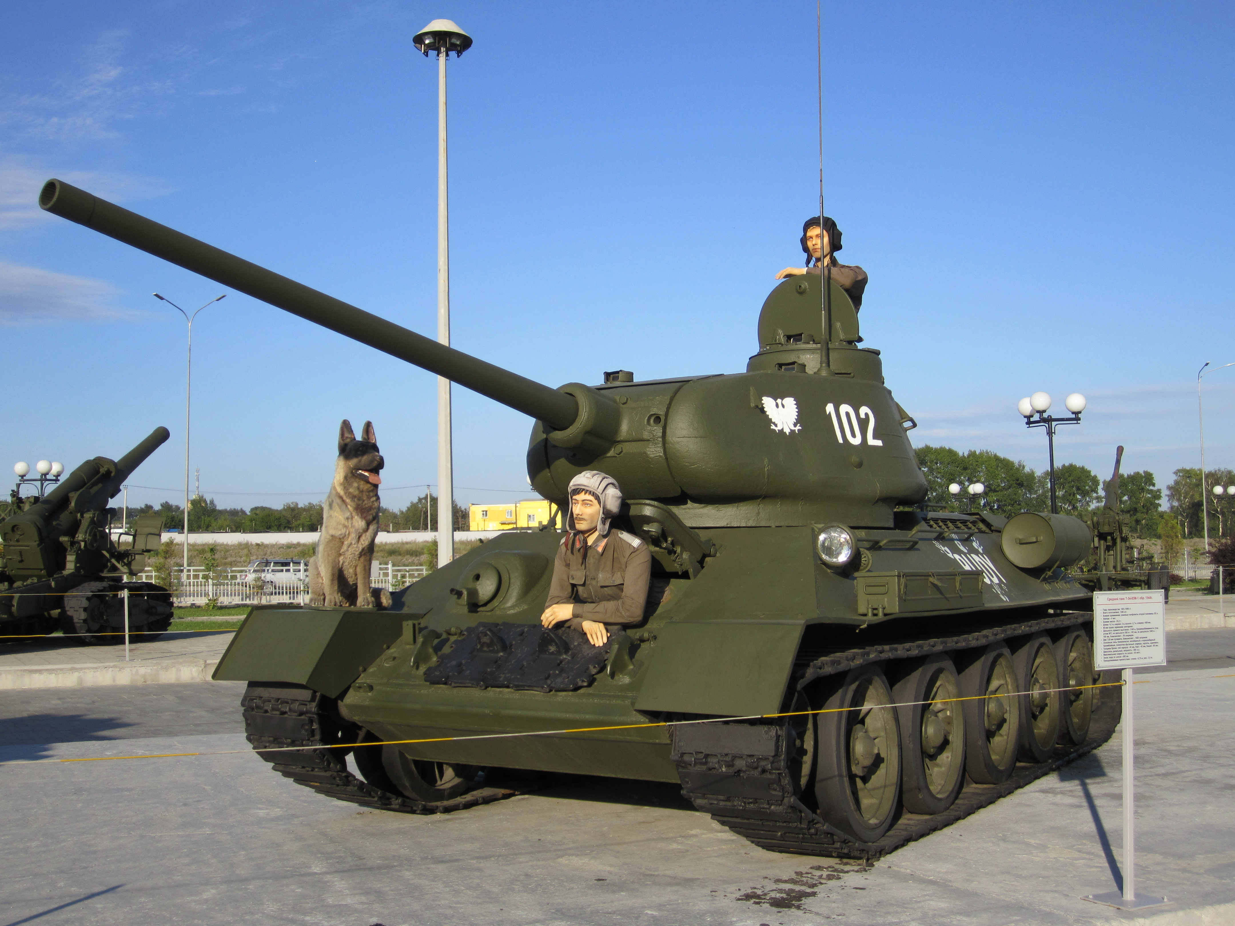 Копия танка "Rudy" из польского сериала "Четыре танкиста и собака" в музее Верхней Пышмы